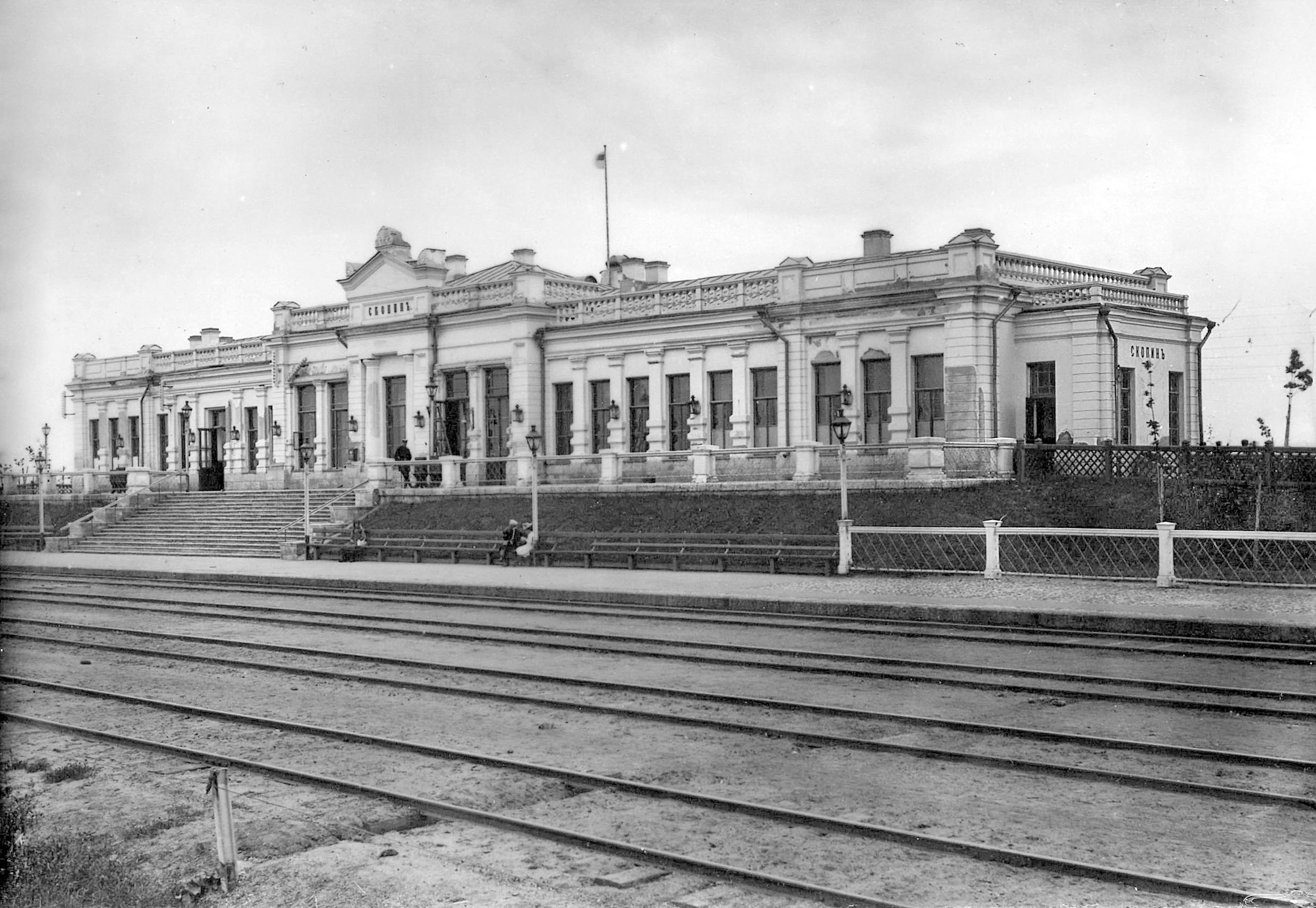 Железнодорожный вокзал г.Скопина Рязанской области, 1910-е гг.